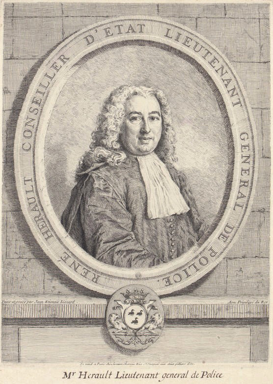 Portrait de René Hérault (1681-1740), conseiller d'Etat, lieutenant général de police de Paris